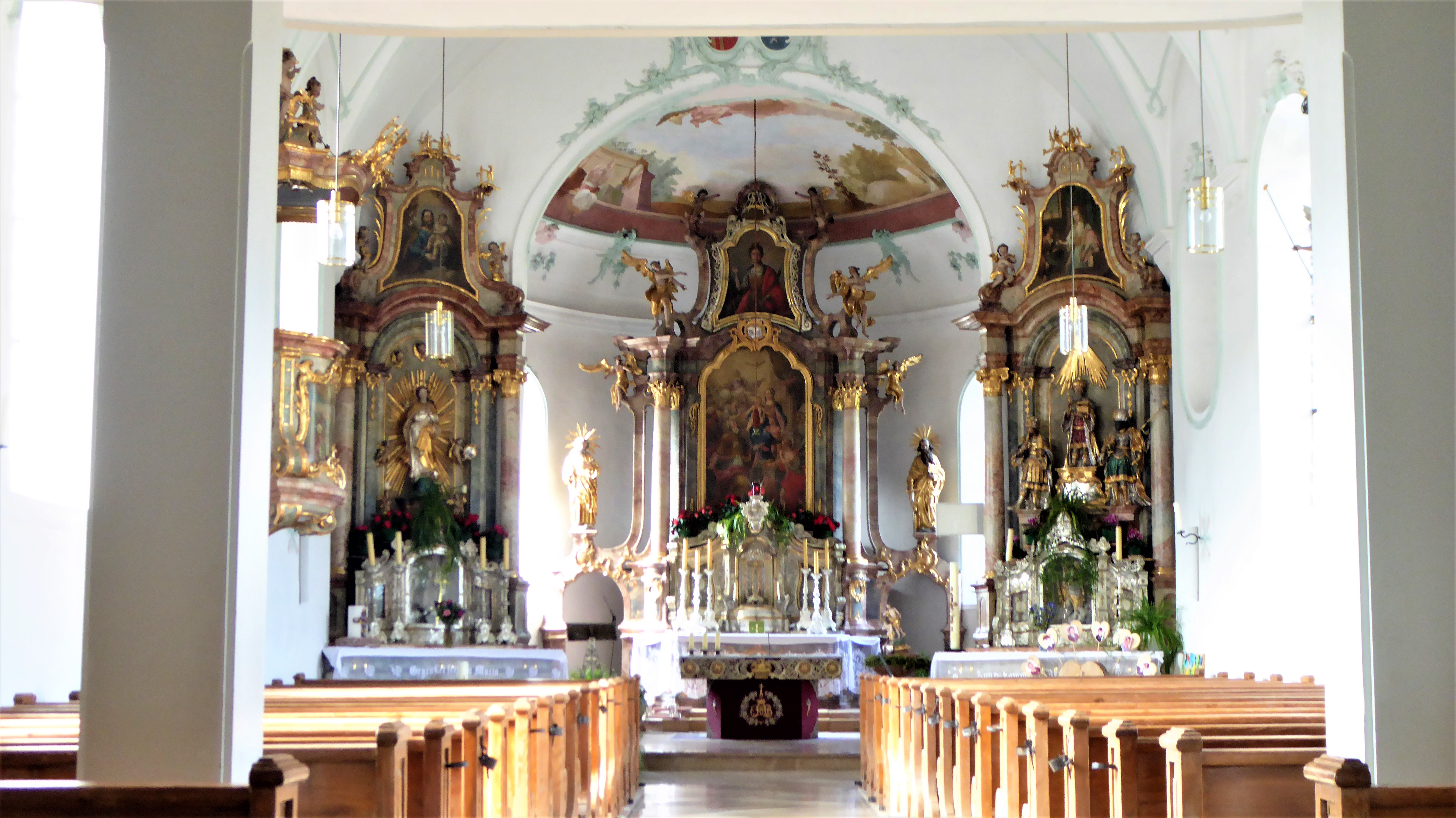 Innenraum von St.Nikolaus / JachenauThis is a photograph of an architectural monument.